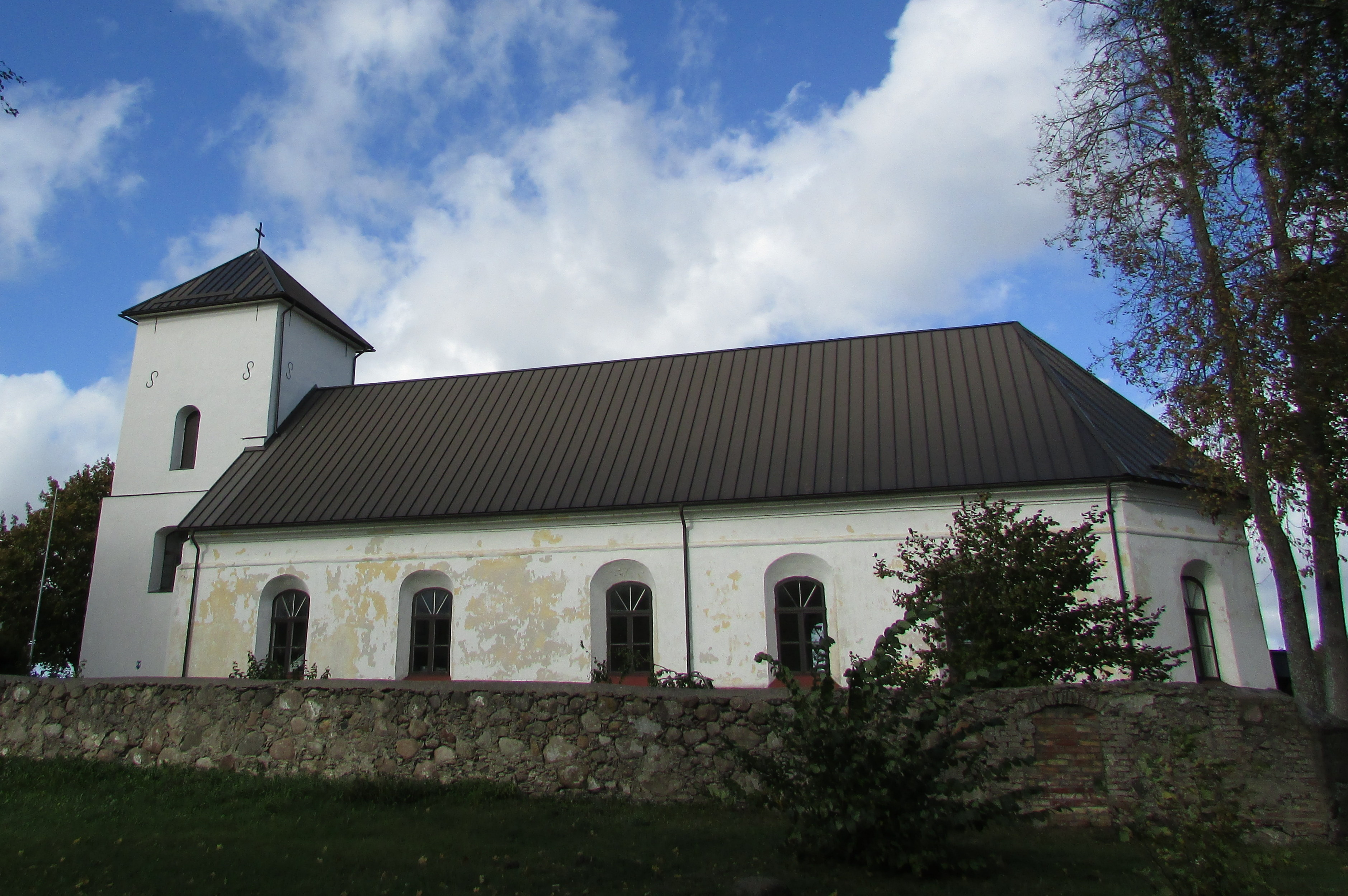 Grobiņas luterāņu baznīca un pilsdrupas, Grobiņa, Lielā iela 21